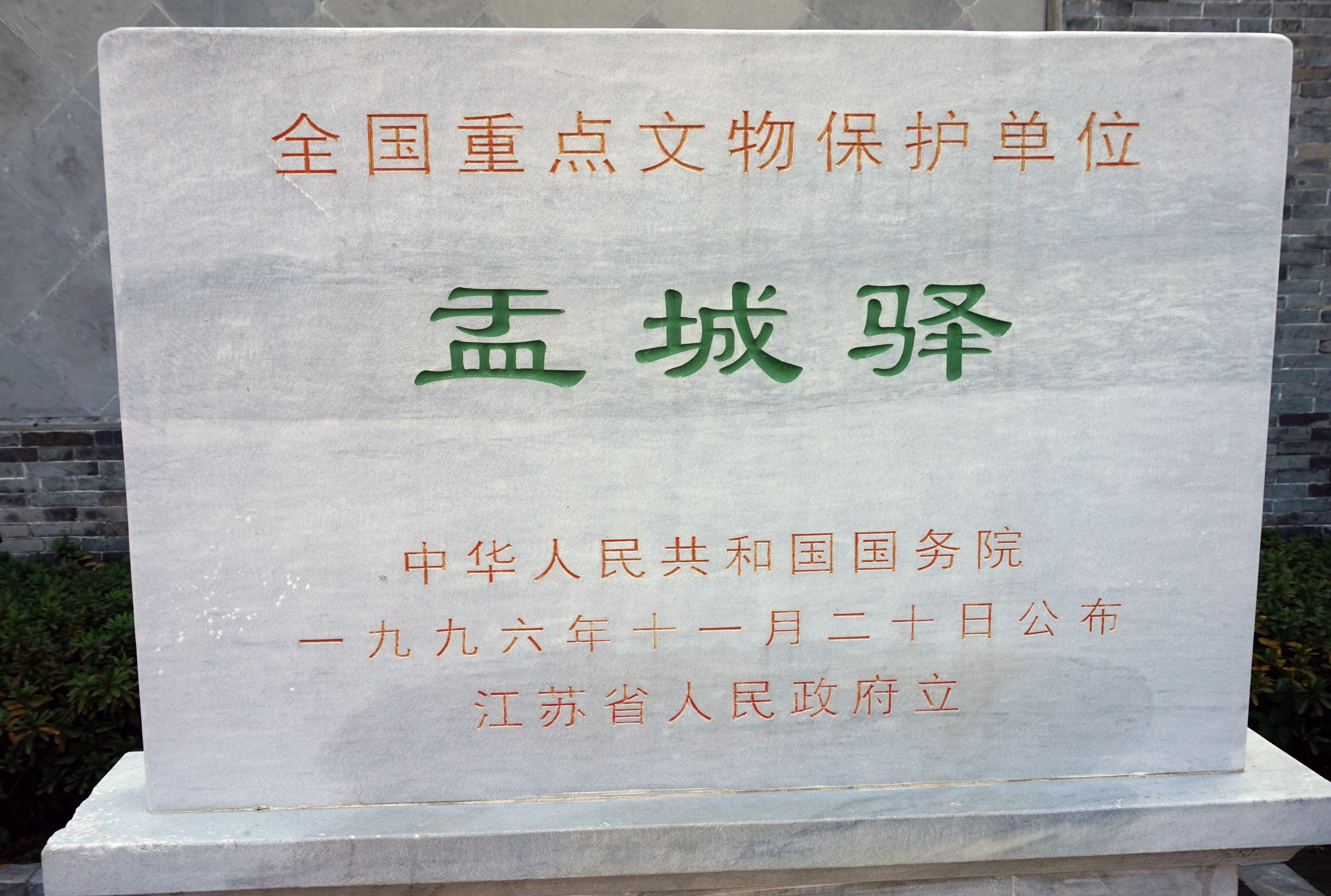 盂城驿国保立碑。